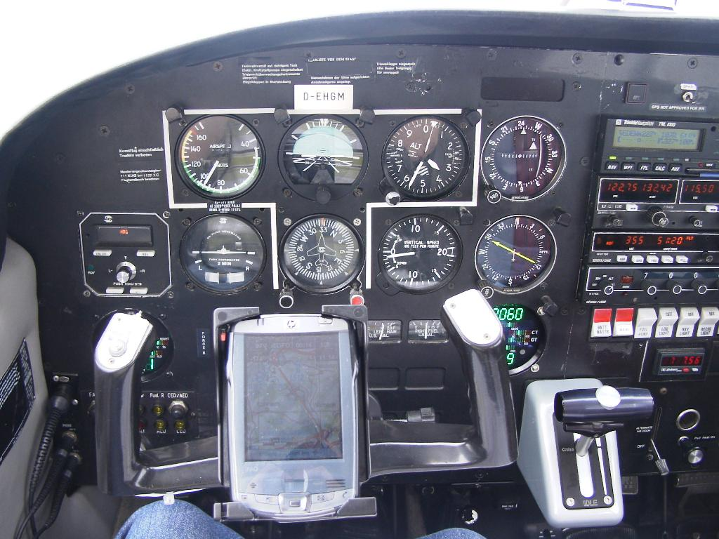 Cockpit querab von Külsheim